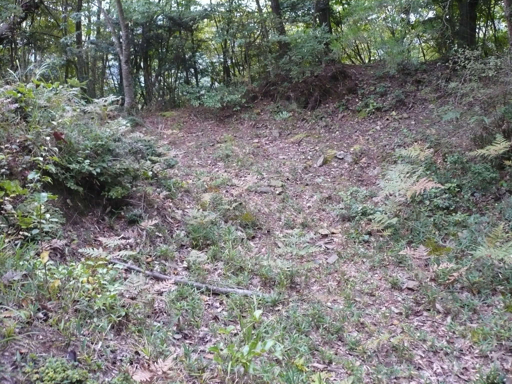 本丸